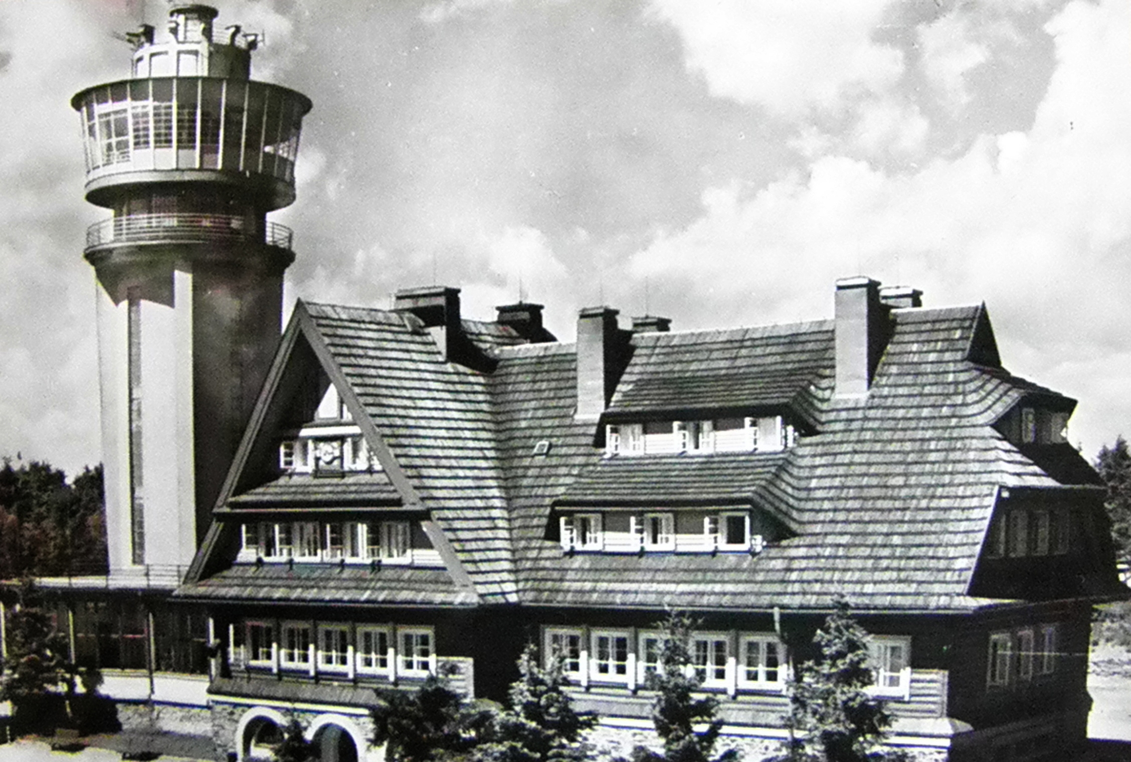 Horský hotel Suchý vrch před požárem 2003